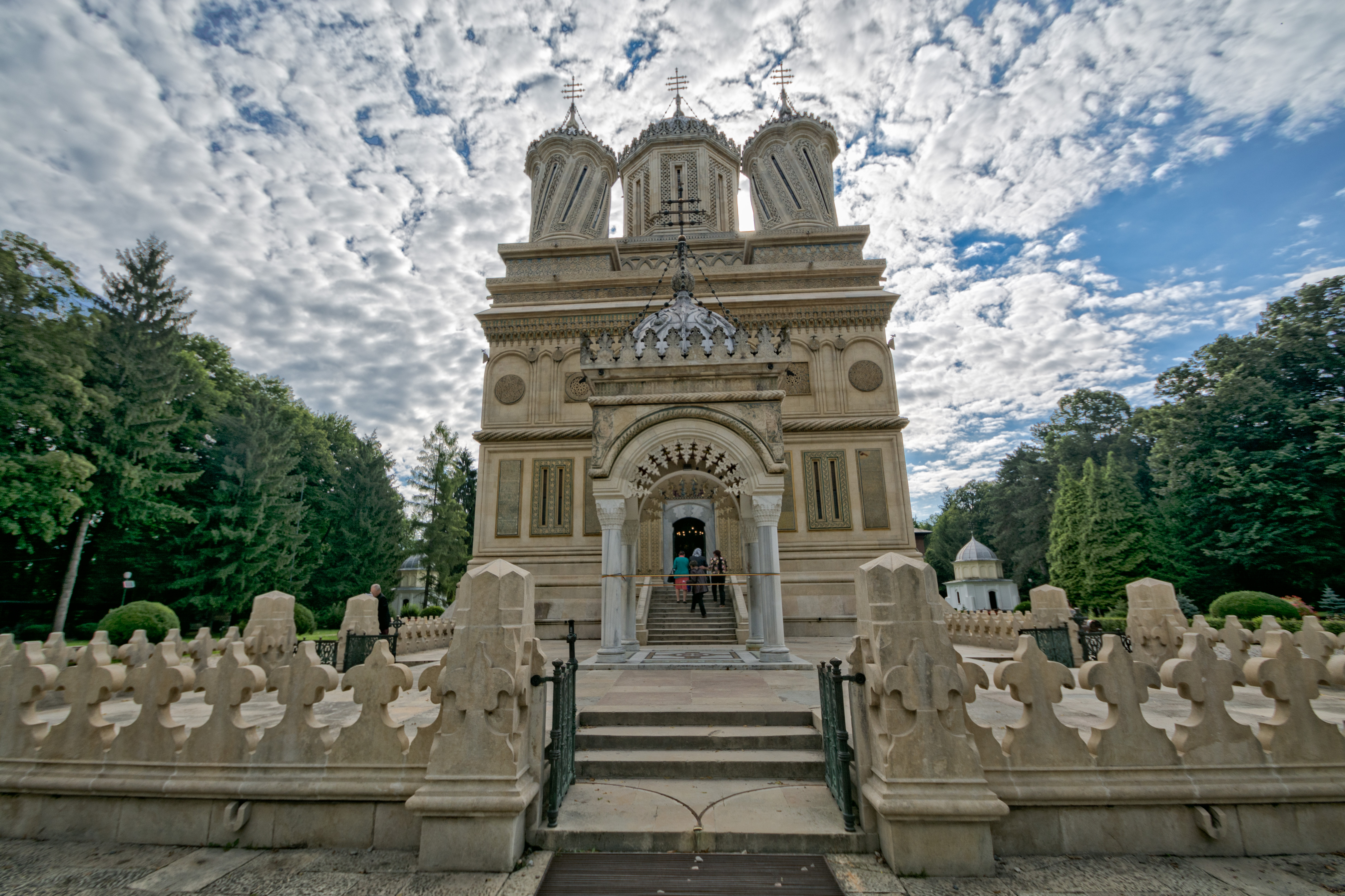 Mănăstirea Argeșului